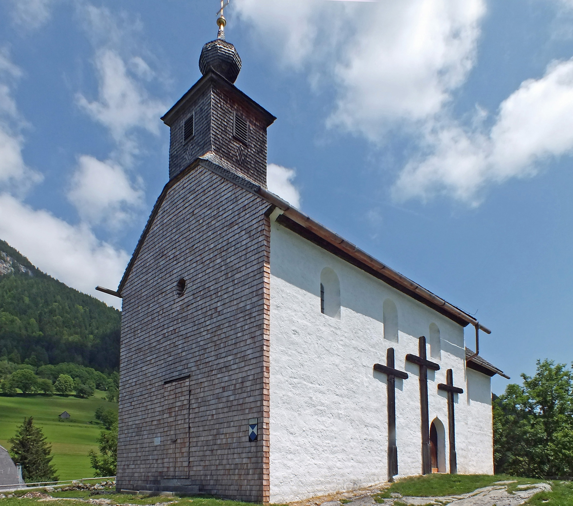 Die Johanneskapelle in Pürgg, Steiermark